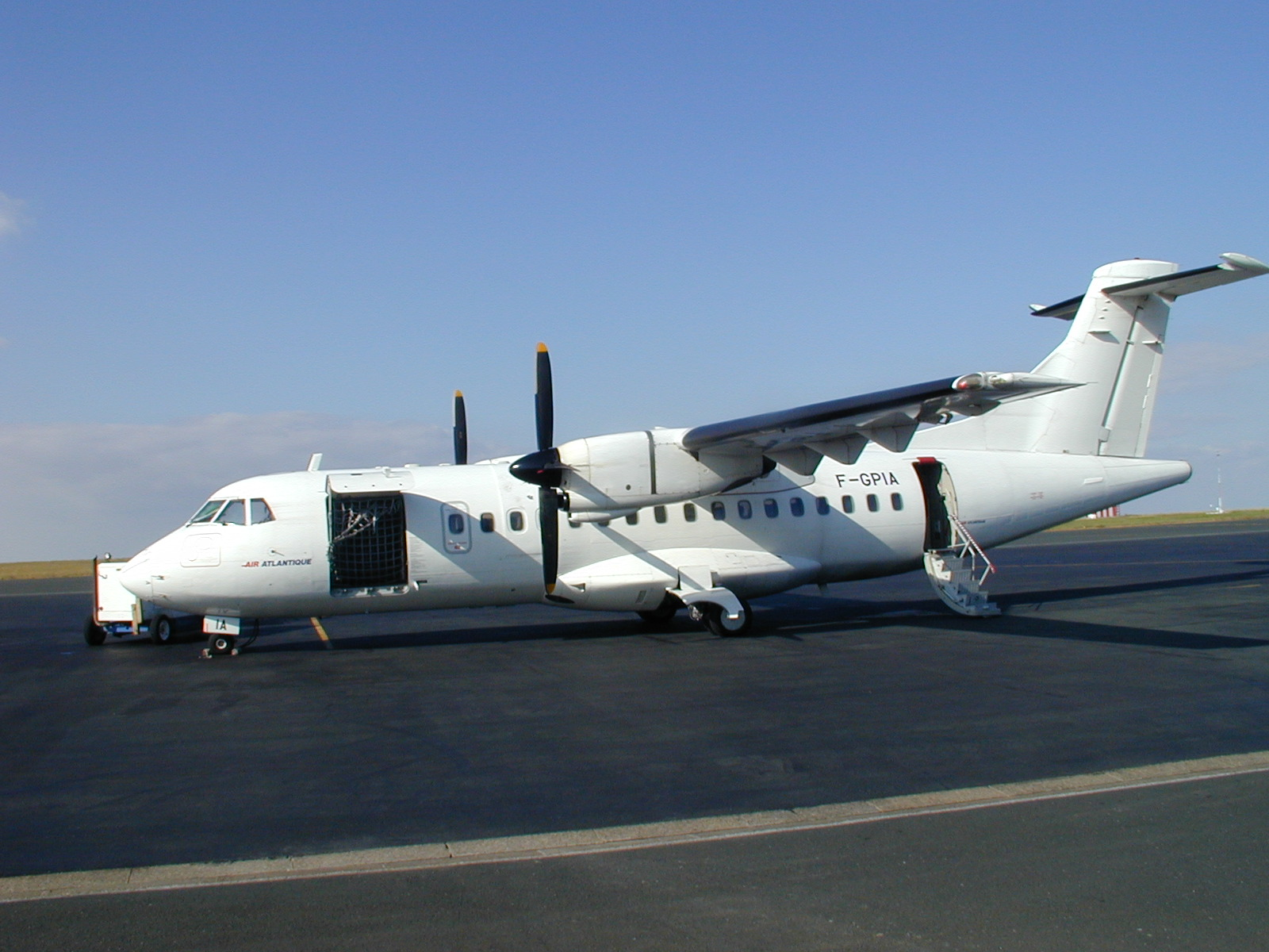 ATR42 de la compagnie aérienne Air Atlantique, sur le tarmac de l'aéroport de La Rochelle.